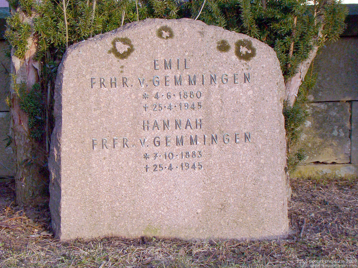 Grabmal für Emil Freiherr von Gemmingen (1880-1945) und Gattin Hannah (1883-1945) auf dem Friedhof in Bad Rappenau-Fürfeld.